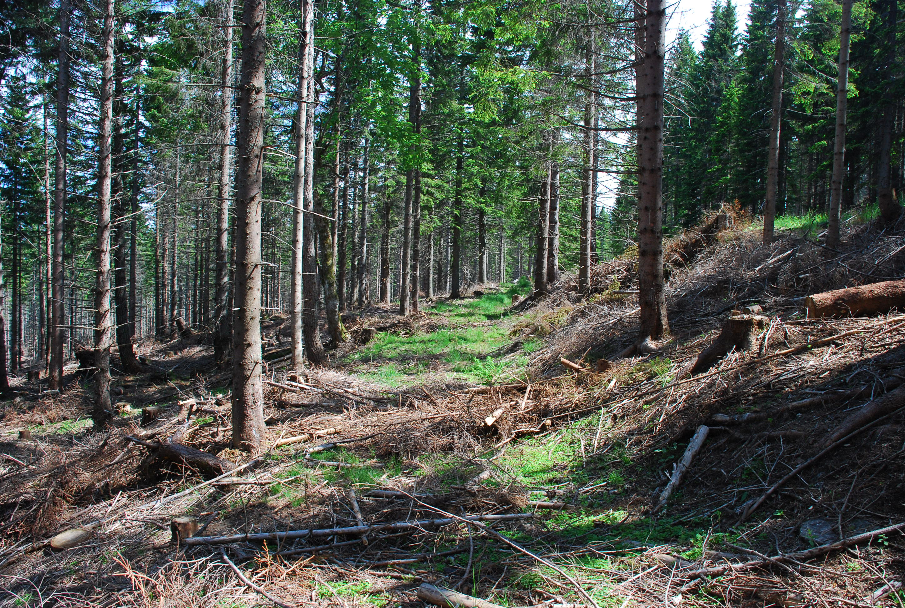 Trasse der ehem. Liechtenstein'schen Waldbahn Deutschlandsberg auf dem Stoffkogel.